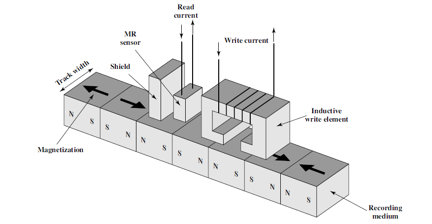 Mekanizmi per shkrim/lexim